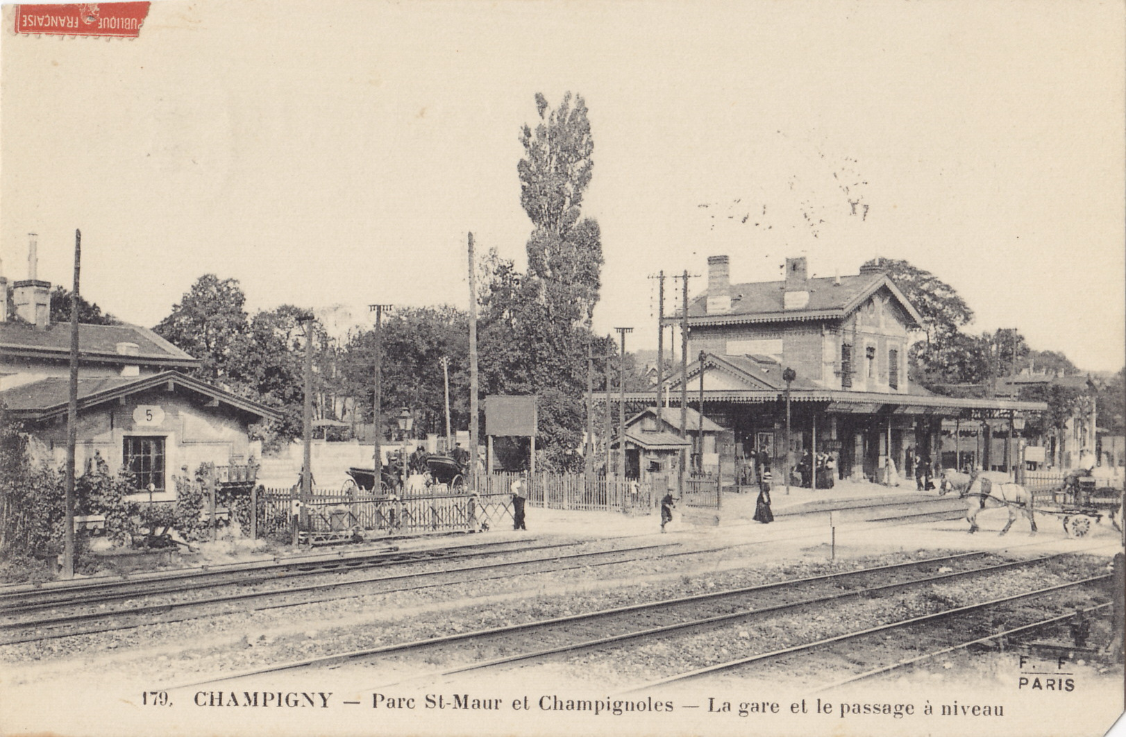 Carte postale ancienne éditée par FF à Paris :CHAMPIGNY - Parc St-Maur et Champignoles - La gare et le passage à niveau